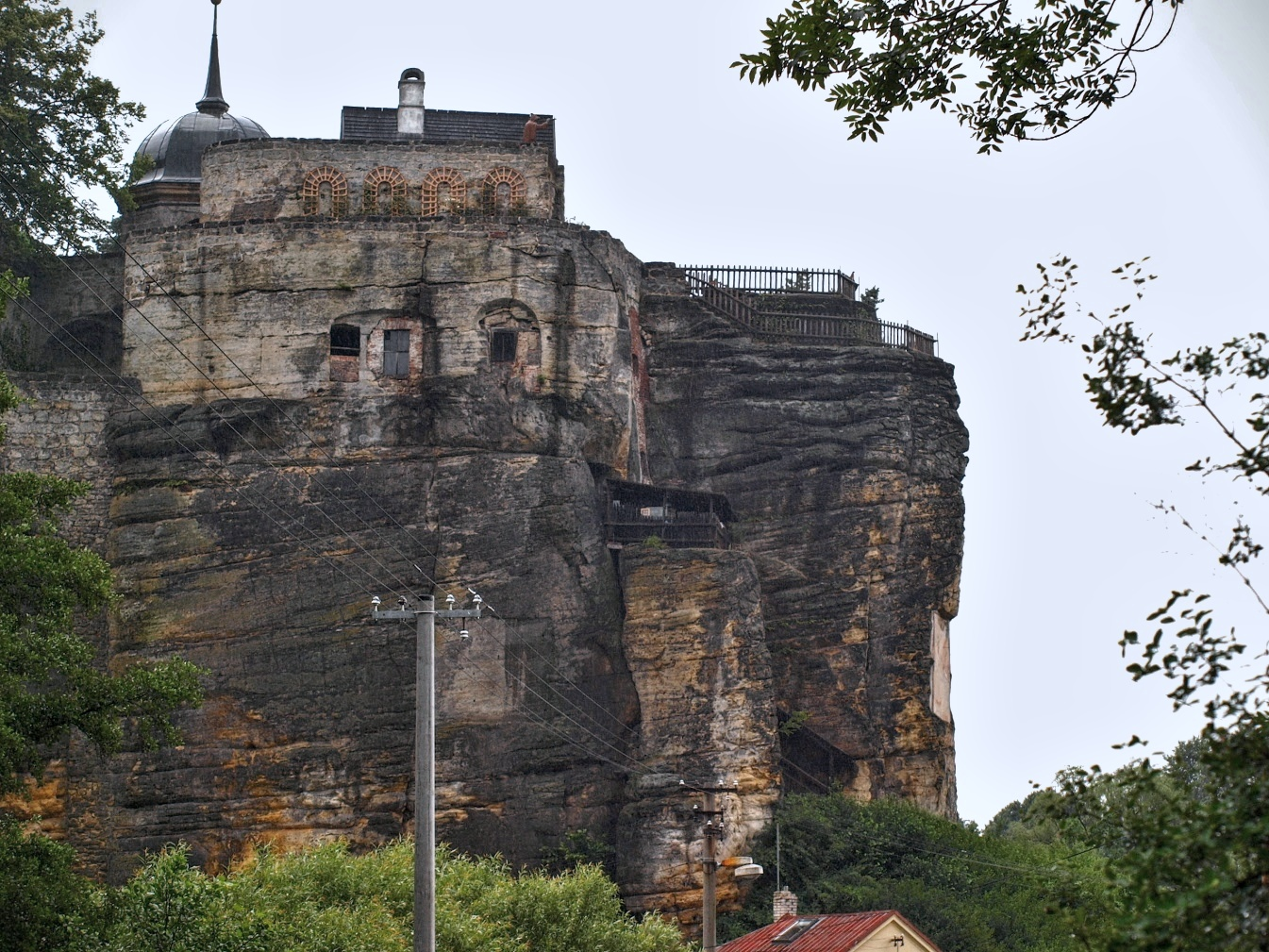 Sloup, skalní hrad